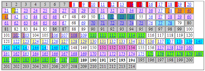 Экспертиза сообщества Диссернет кадидатской диссертации Полтавченко Г.С.